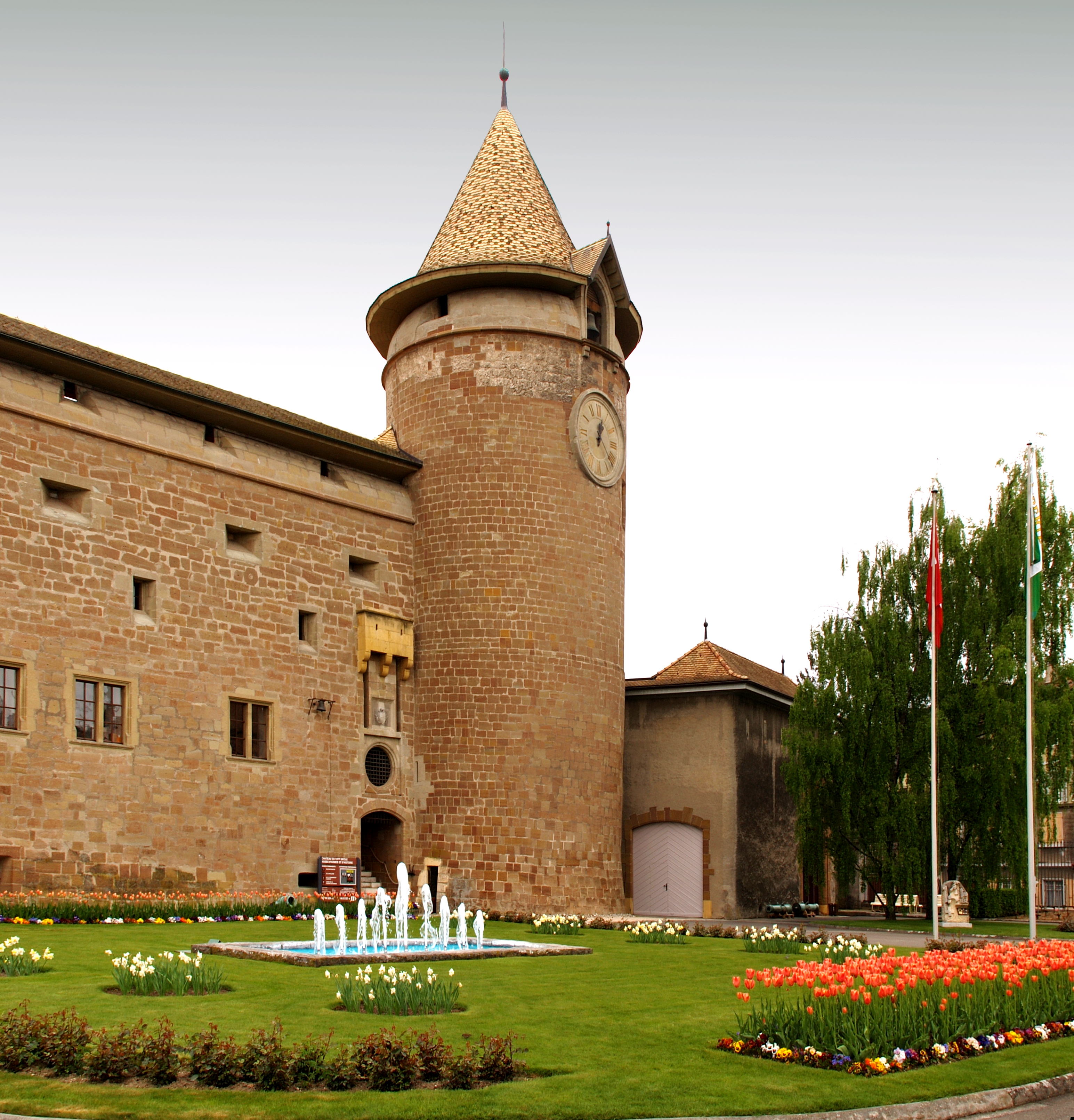 Morges (Suisse) - L'entrée du château